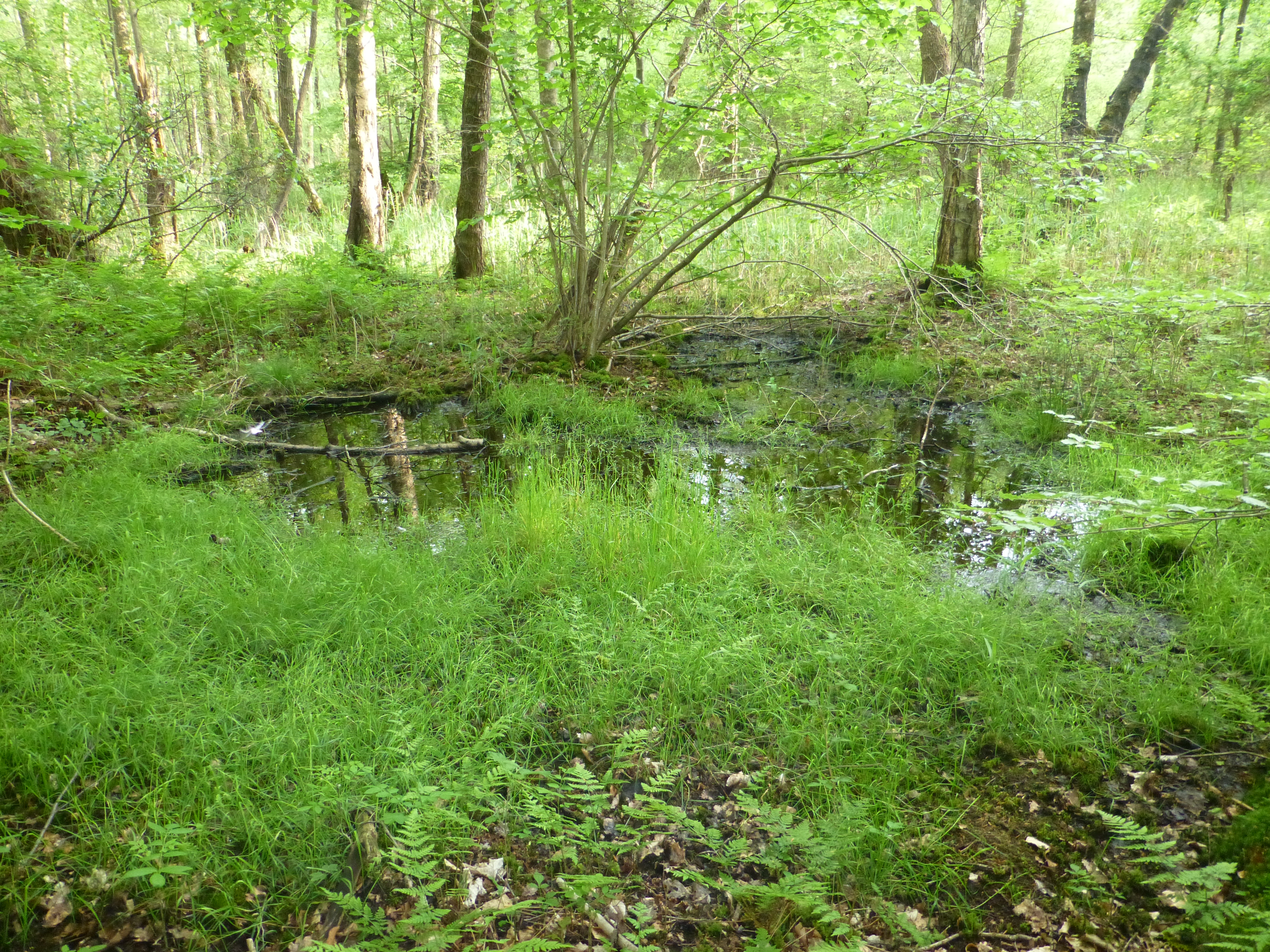 Ein kleiner Tümpel im Bruchwald bei Ehrenburg (NSG HA 122)